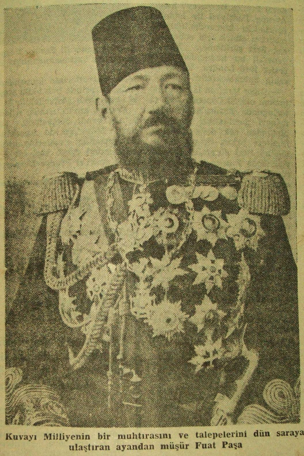 Deli Fuad Paşa nâmıyla tanınmış Fuad Paşa